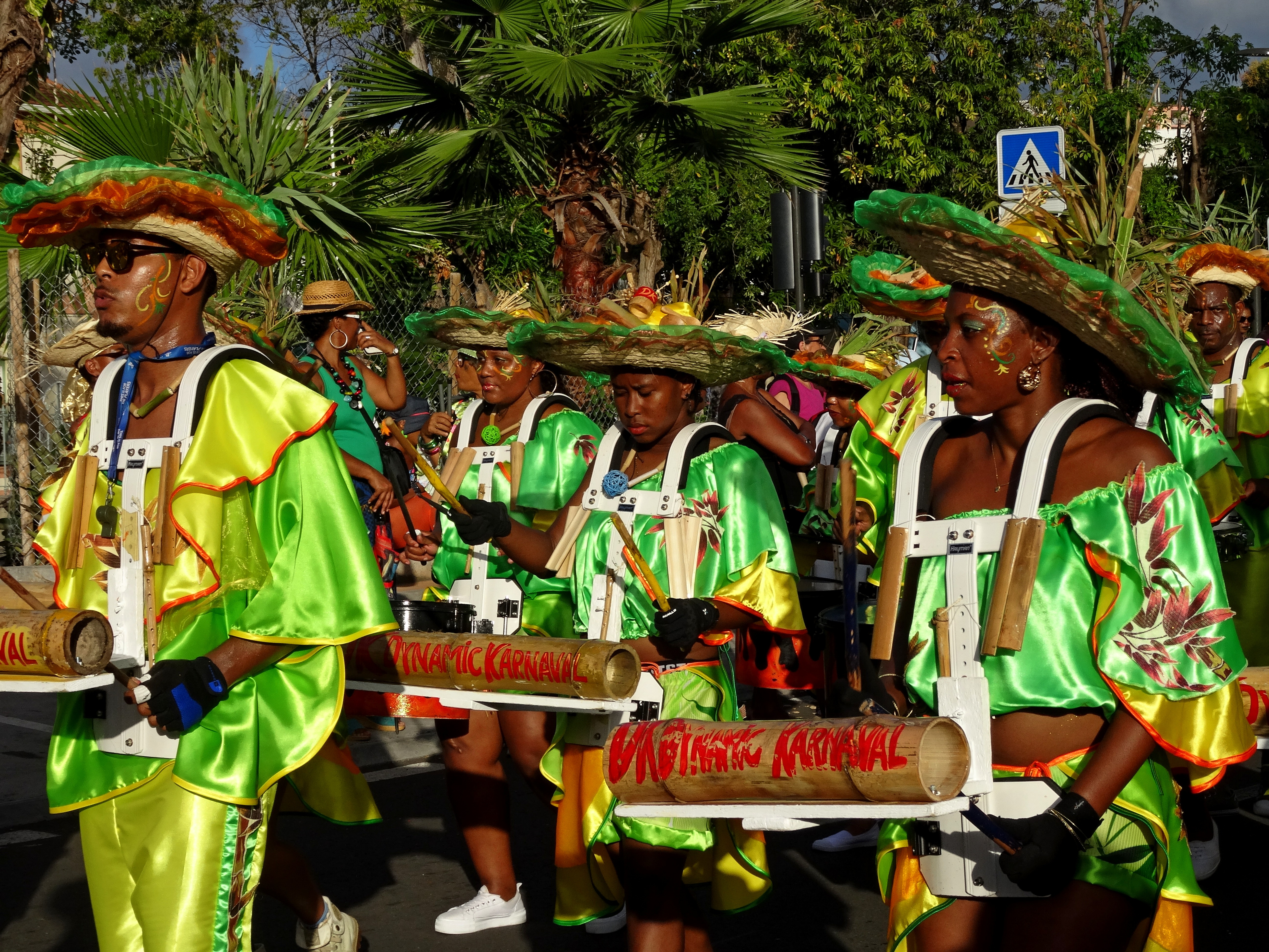 Le carnaval de Fort de France (Martinique) est une fête très populaire qui a lieu entre l'épiphanie et le carême,. Il dure quatre jours, du dimanche gras au marcredi des cendres. Les groupes spontanés ou organisés défilent les après midi dans les rues aux sons d'instruments de tous bords, le défilé le plus populaire reste celui dans la capitale, Fort de France.